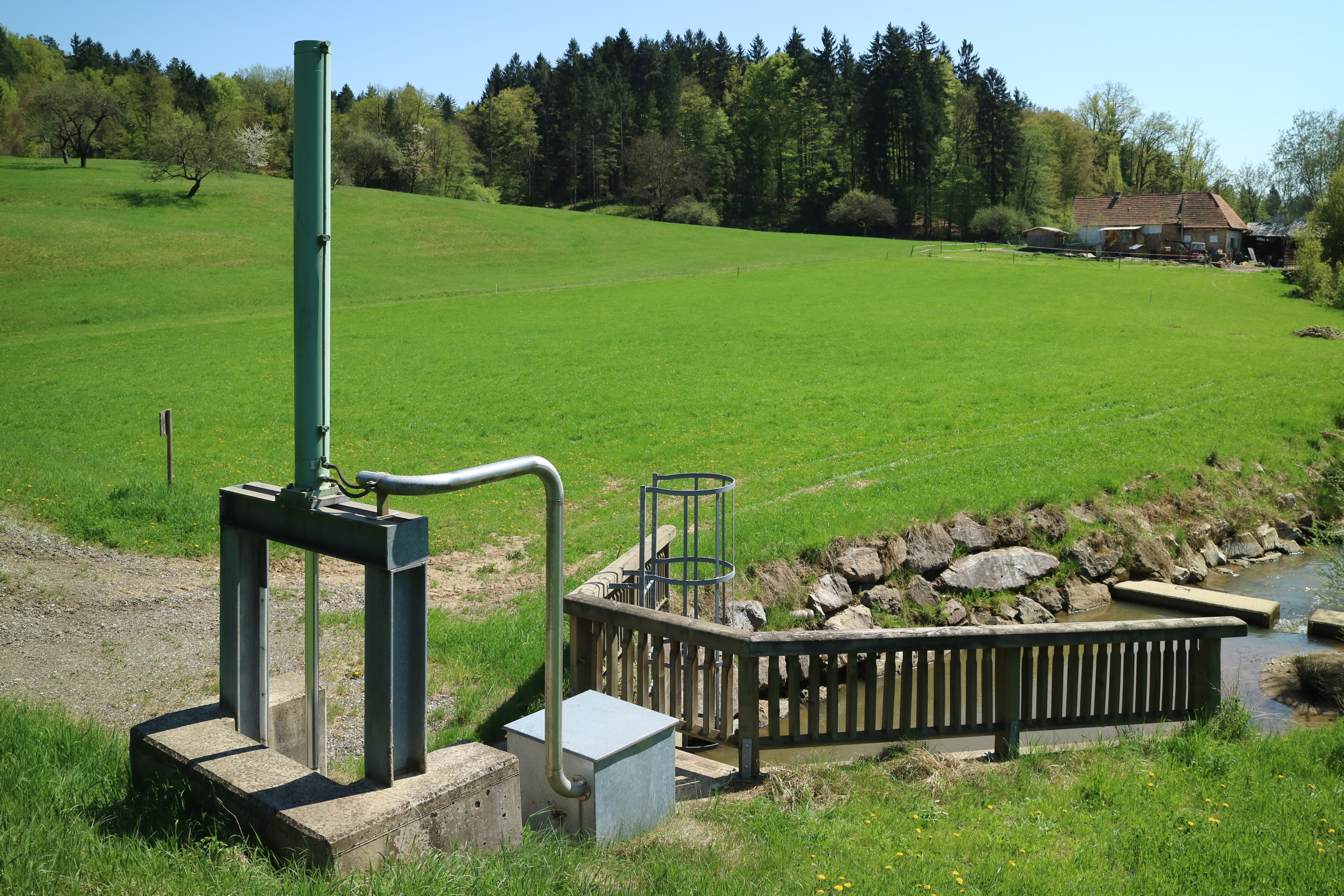 Auslass des Rückhaltebeckens am Doblbach, Gemeinden Haselsdorf-Tobelbad/Seiersberg-Pirka (Steiermark)